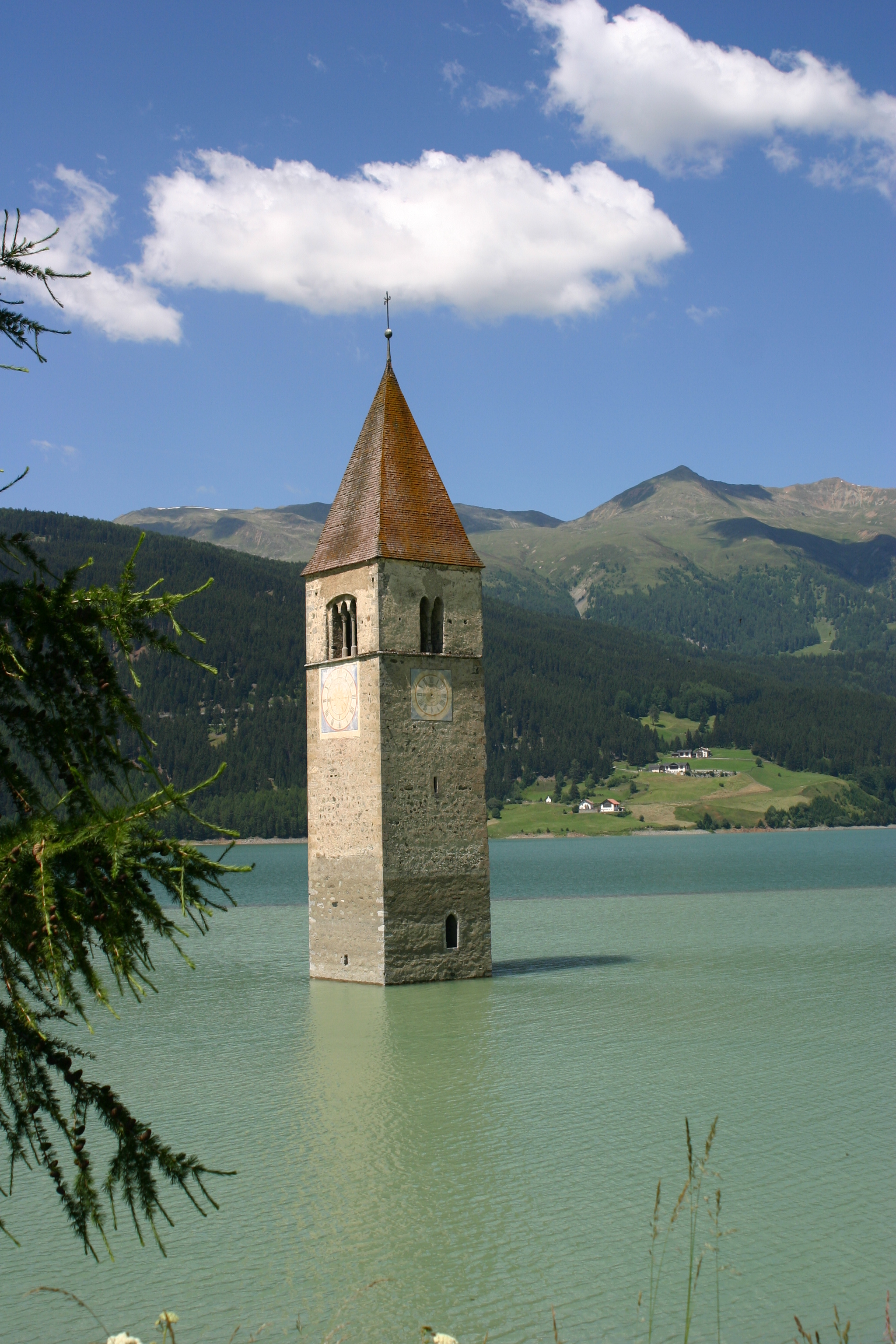 Reschensee, Graun / Südtirol / Italy